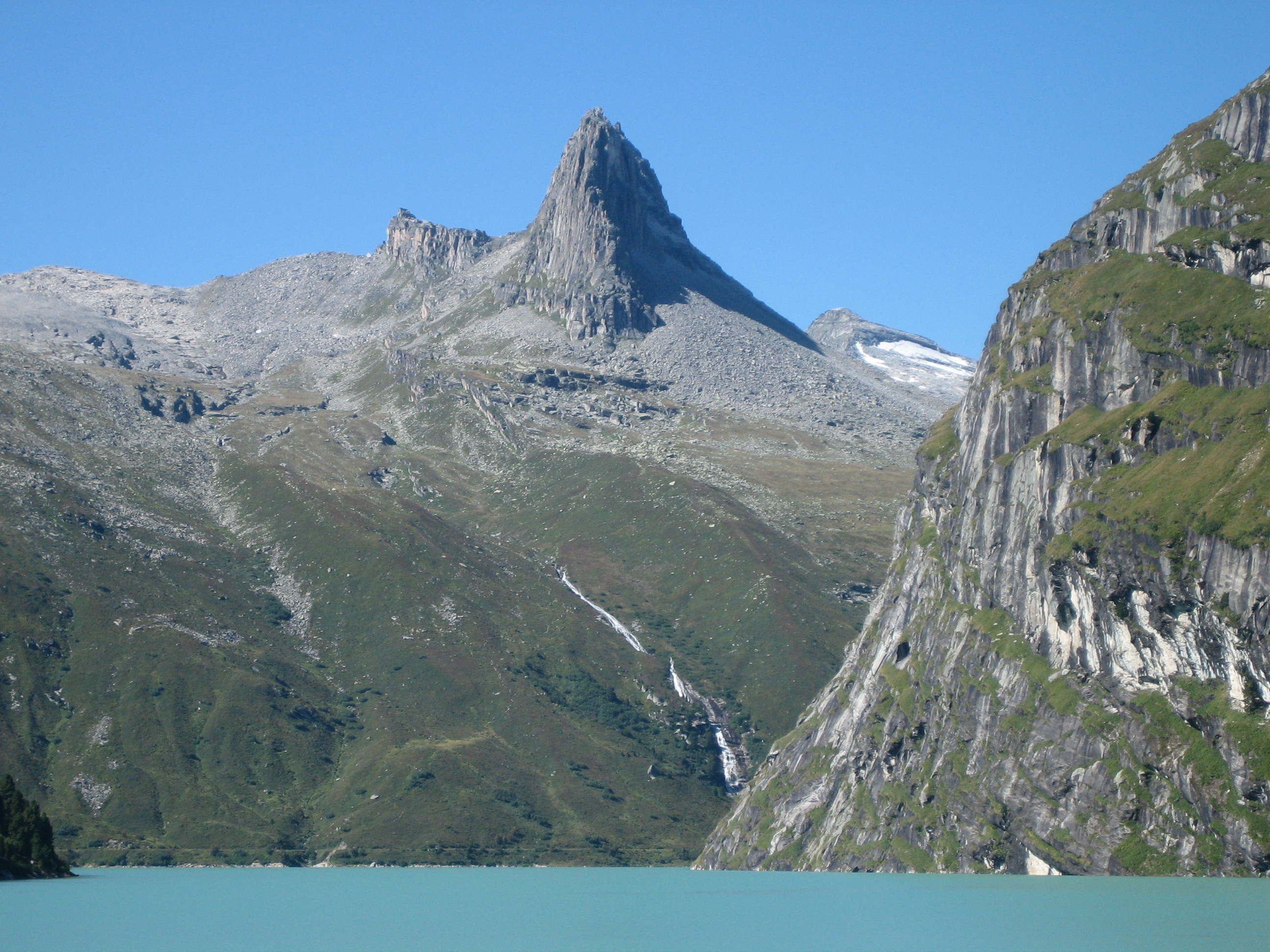 Zervreilahorn